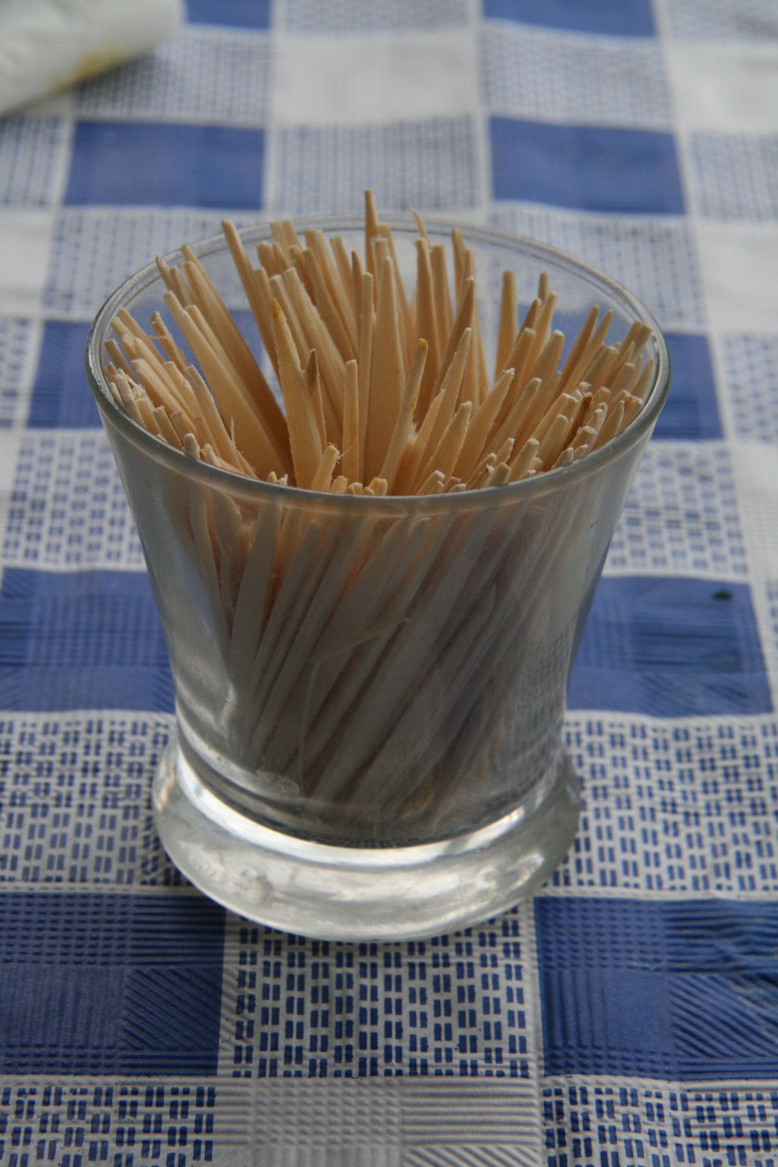 Vaso con palilllos - palillero